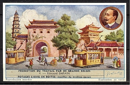 Chromo illustrant la réalisation de tramway et autres chantiers avec portrait d'Edouard Empain en médaillon.